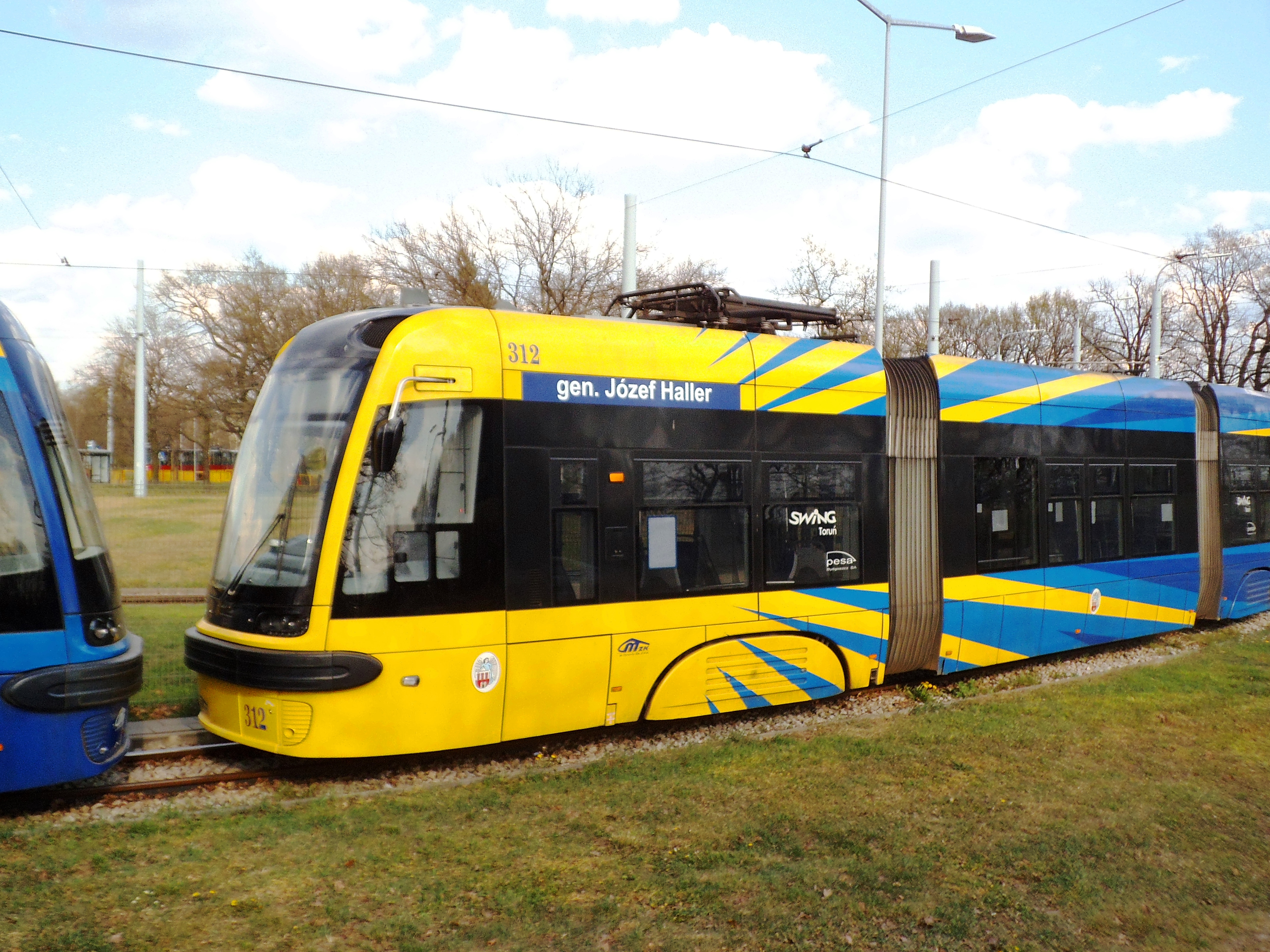 Niskopodłogowy tramwaj Pesa Swing, Toruń